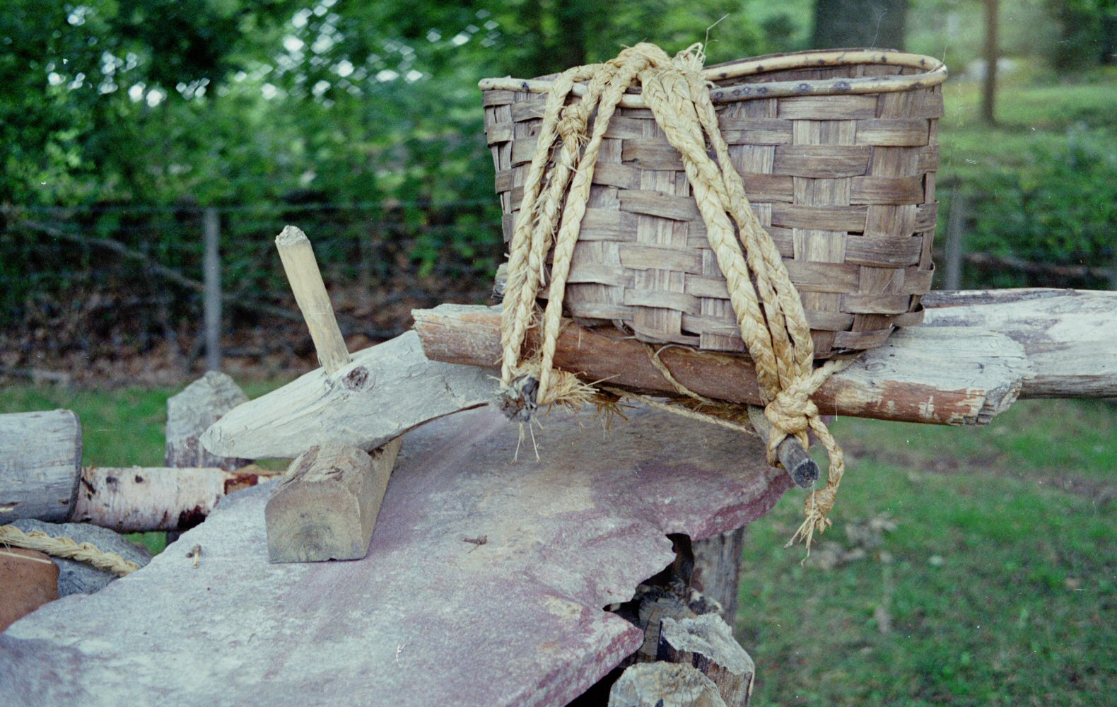 Beispiel für Experimentelle Archäologie - Vorgeschichtl. Korb